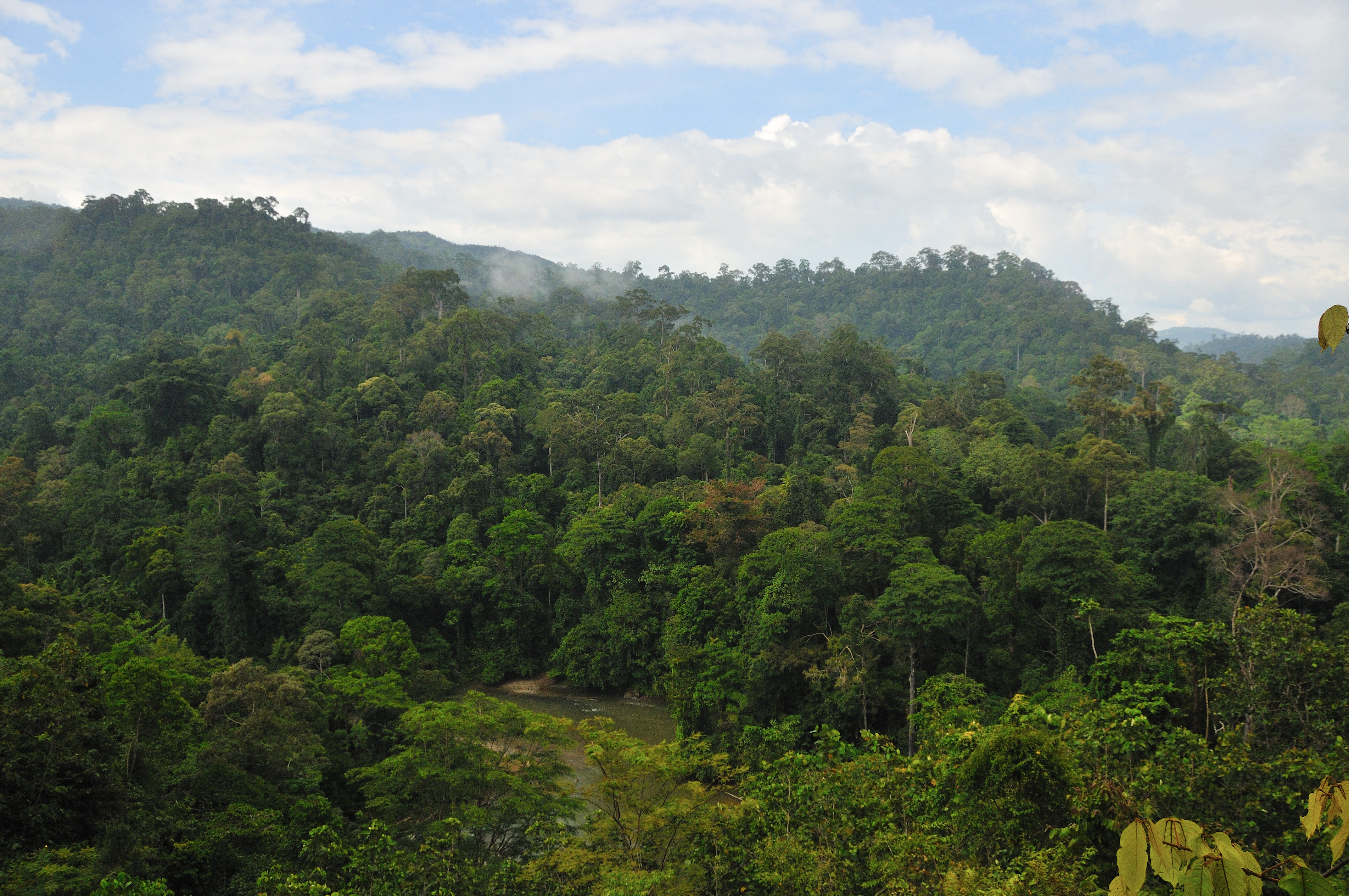 Der Kehje Sewen Schutz Wald, in dem Orang-Utans von der BOS Foundation ausgewildert werden.